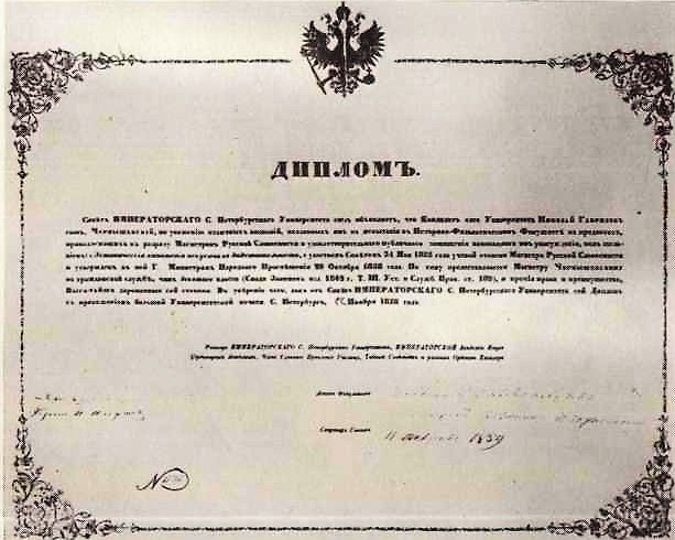 Certificato del Dottorato in Letteratura russa rilasciato a Černyševskij il 29 ottobre (10 novembre) 1858